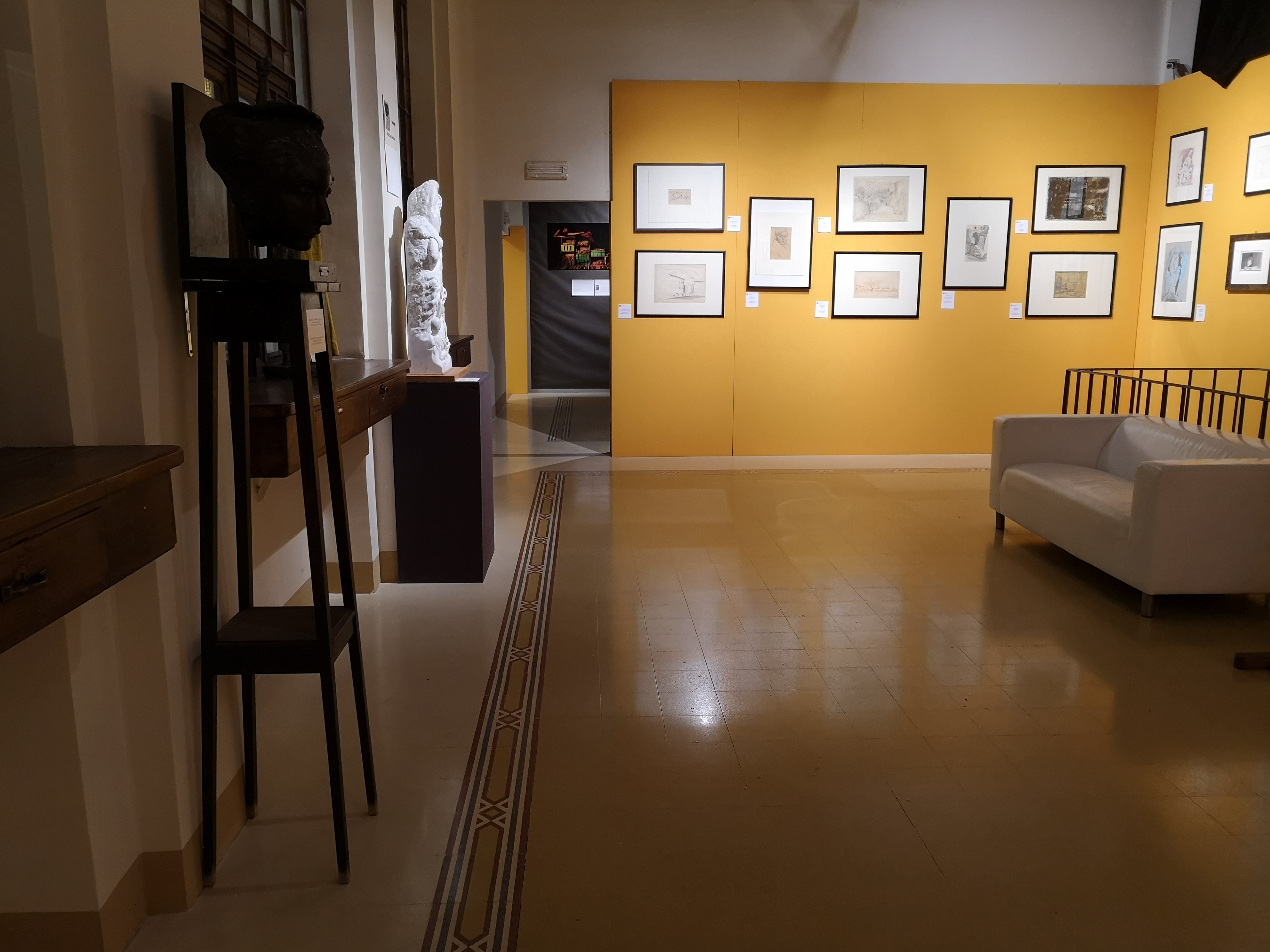 Sale interne del MO.C.A. di Montecatini Terme